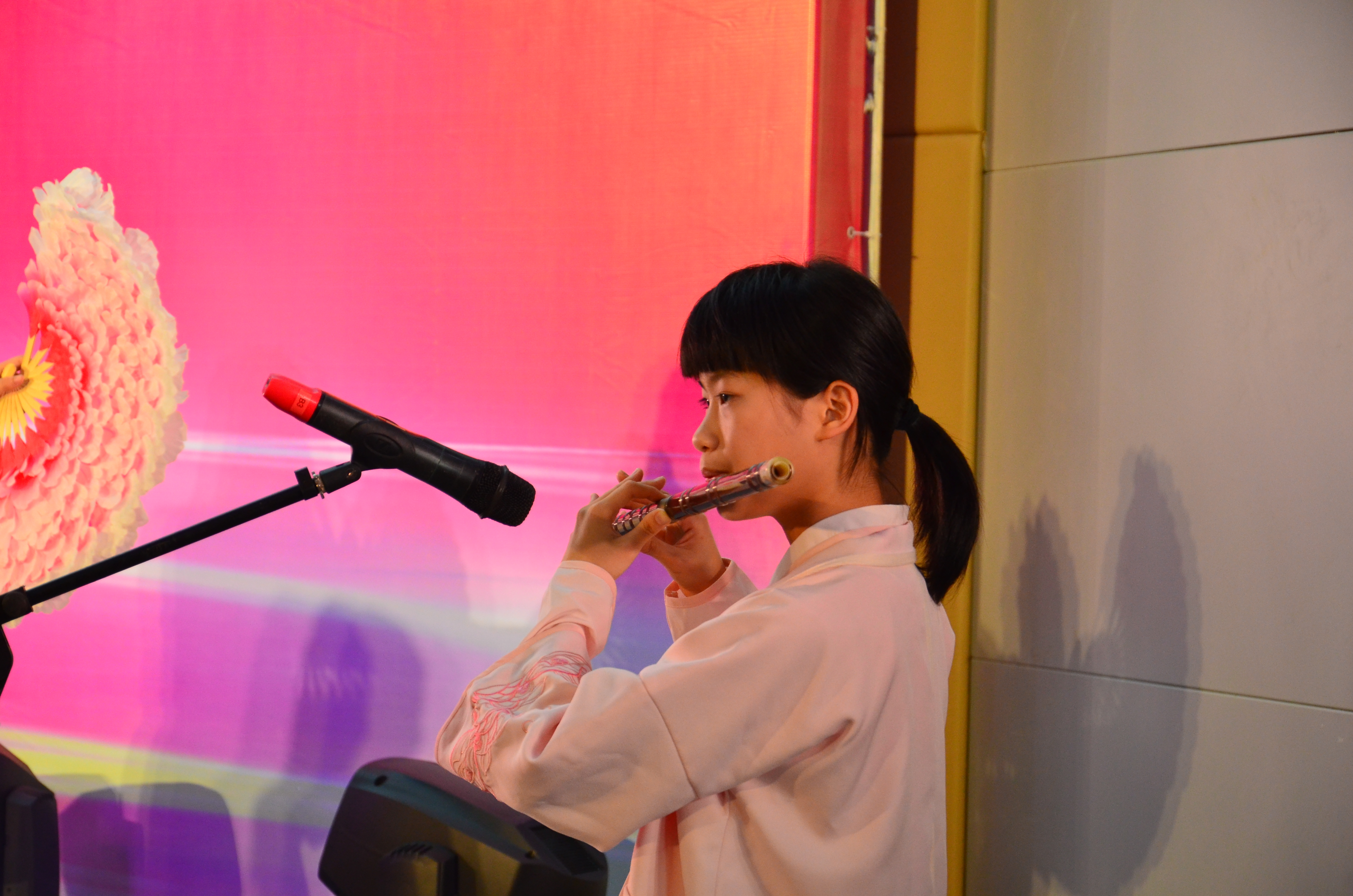 2017福州三中社巡中心舞台古风社表演的歌舞《司花令》。